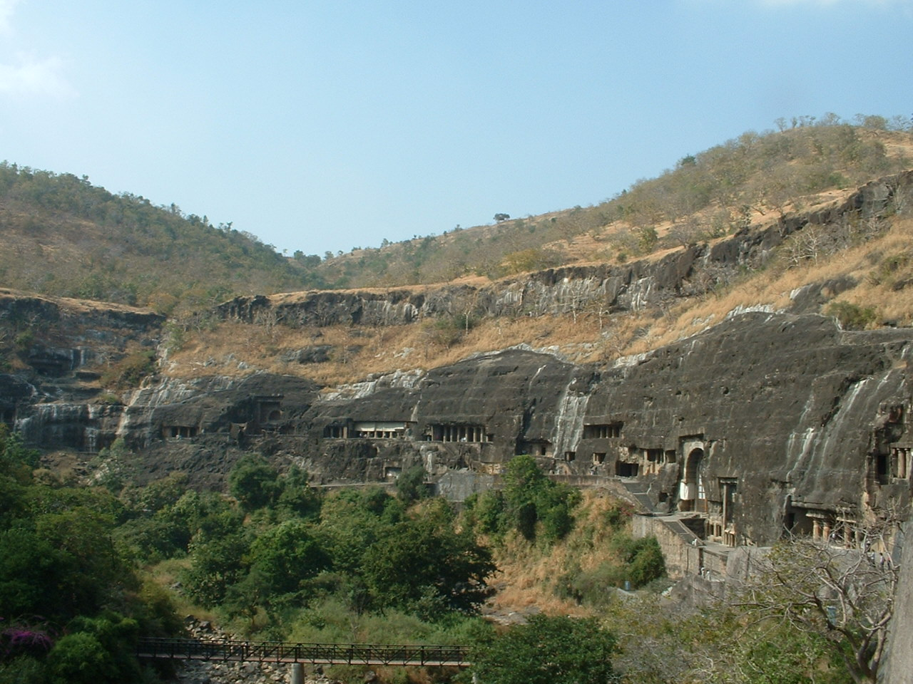 Ajantha